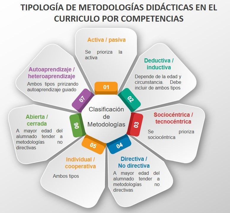 Tipologías de metodologías didácticas en el curriculo por competencias